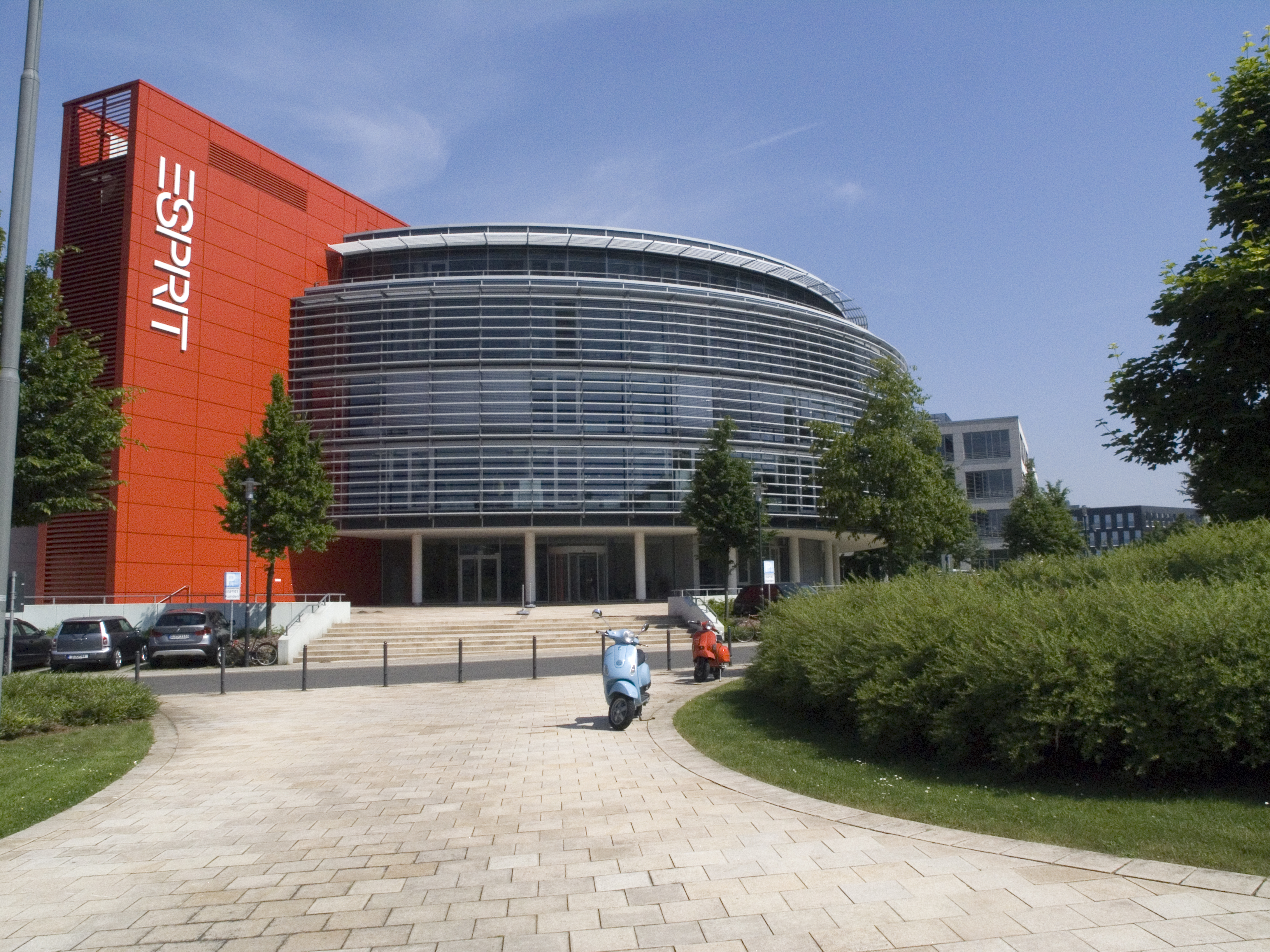 Северный Рейн-Вестфалия, Ратинген - Штаб-квартира "Esprit"